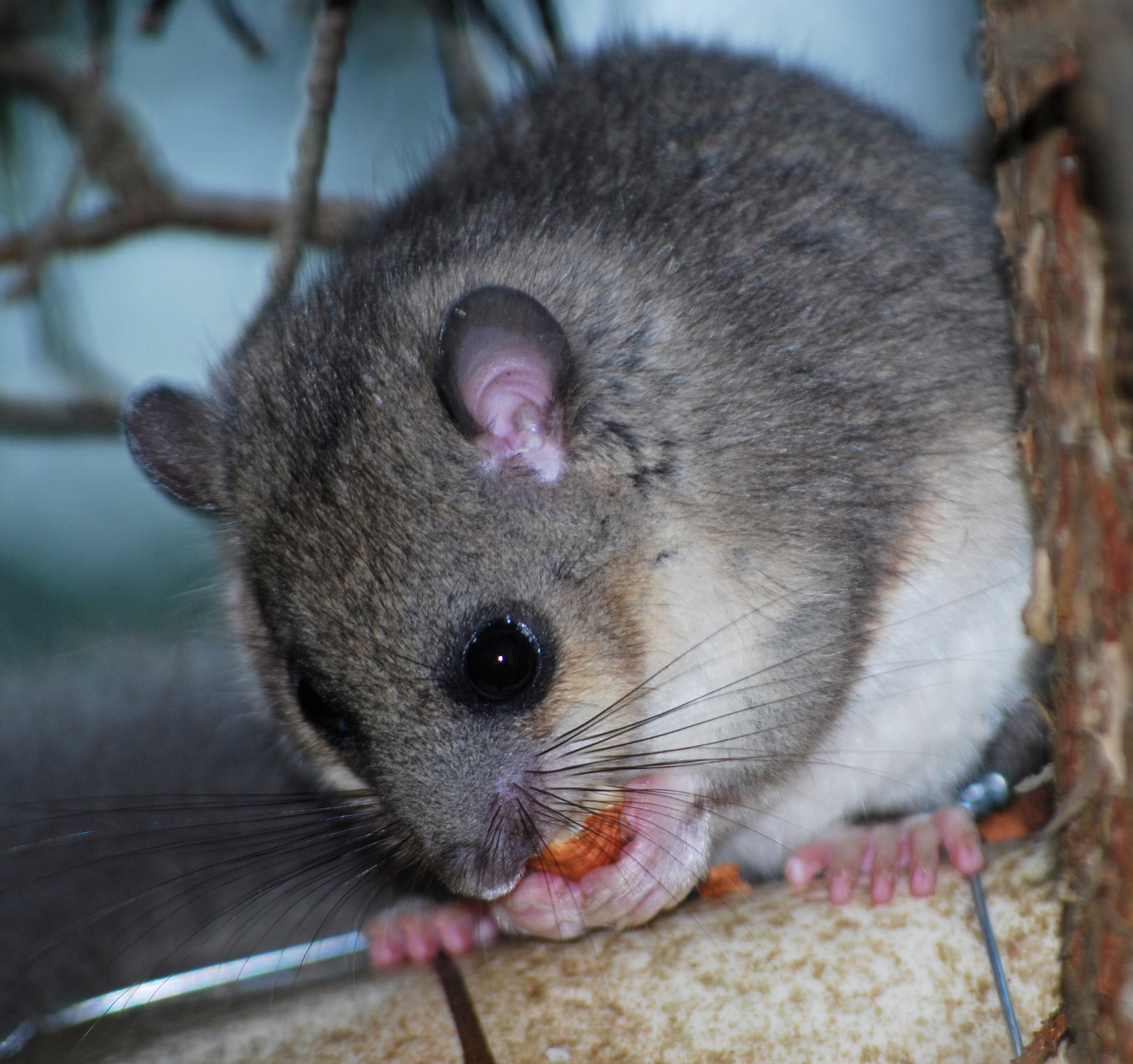 Siebenschläfer frisst Haselnuss